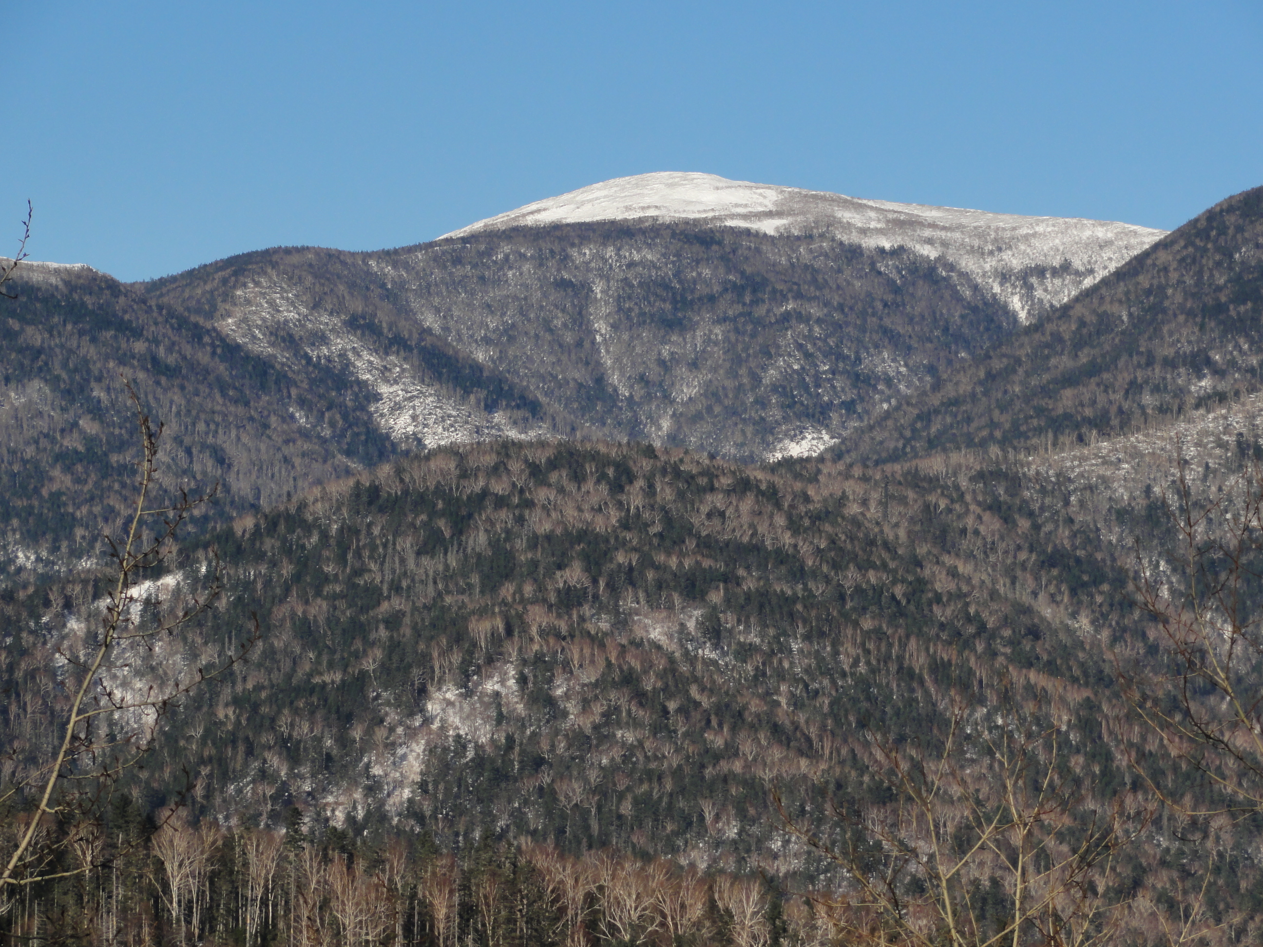 Гора Глухоманка - высшая точка Дальнегорского городского округа